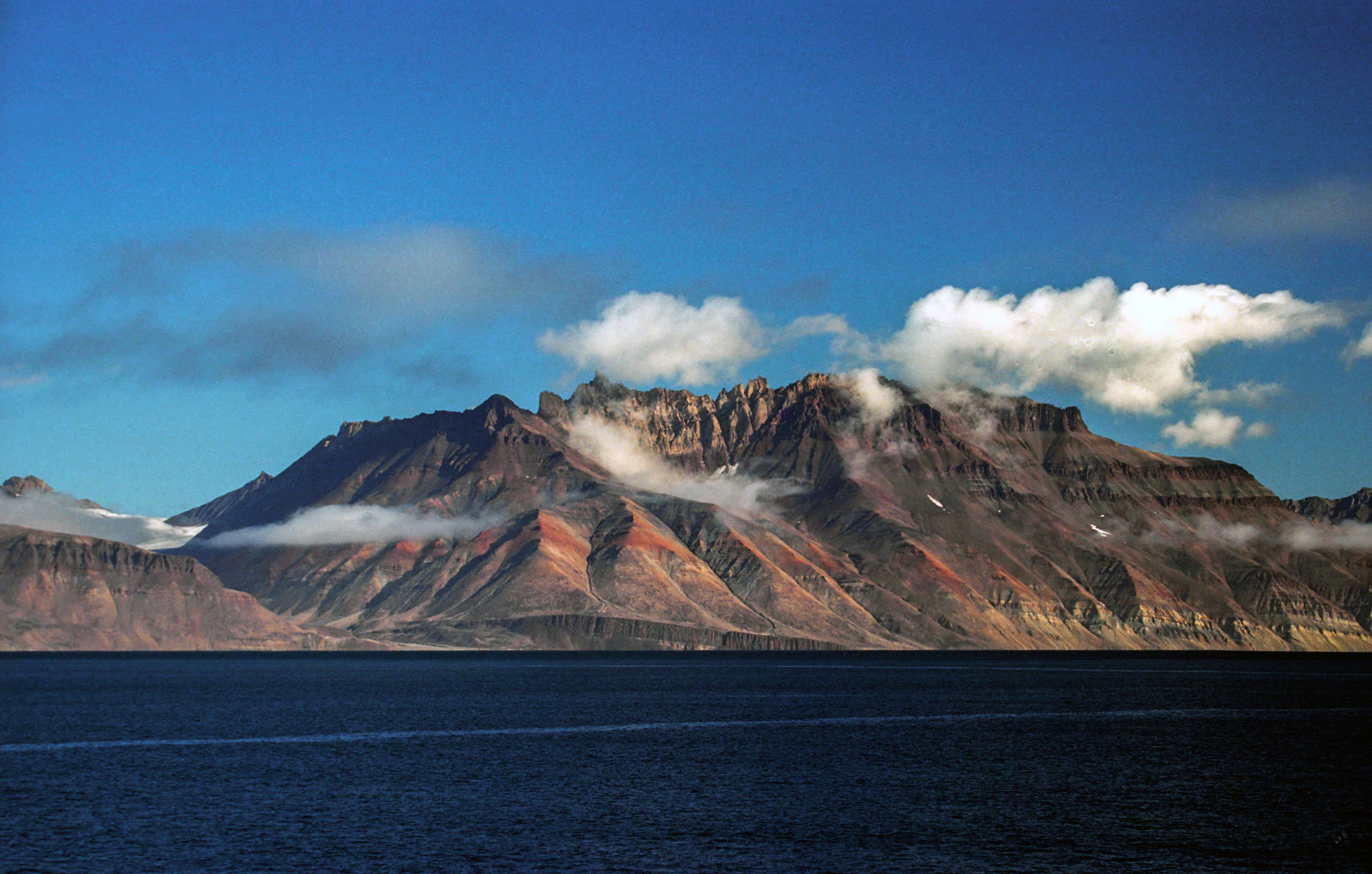 Krajobraz wyspy Ymers widziany z Franz Jozef Fiord